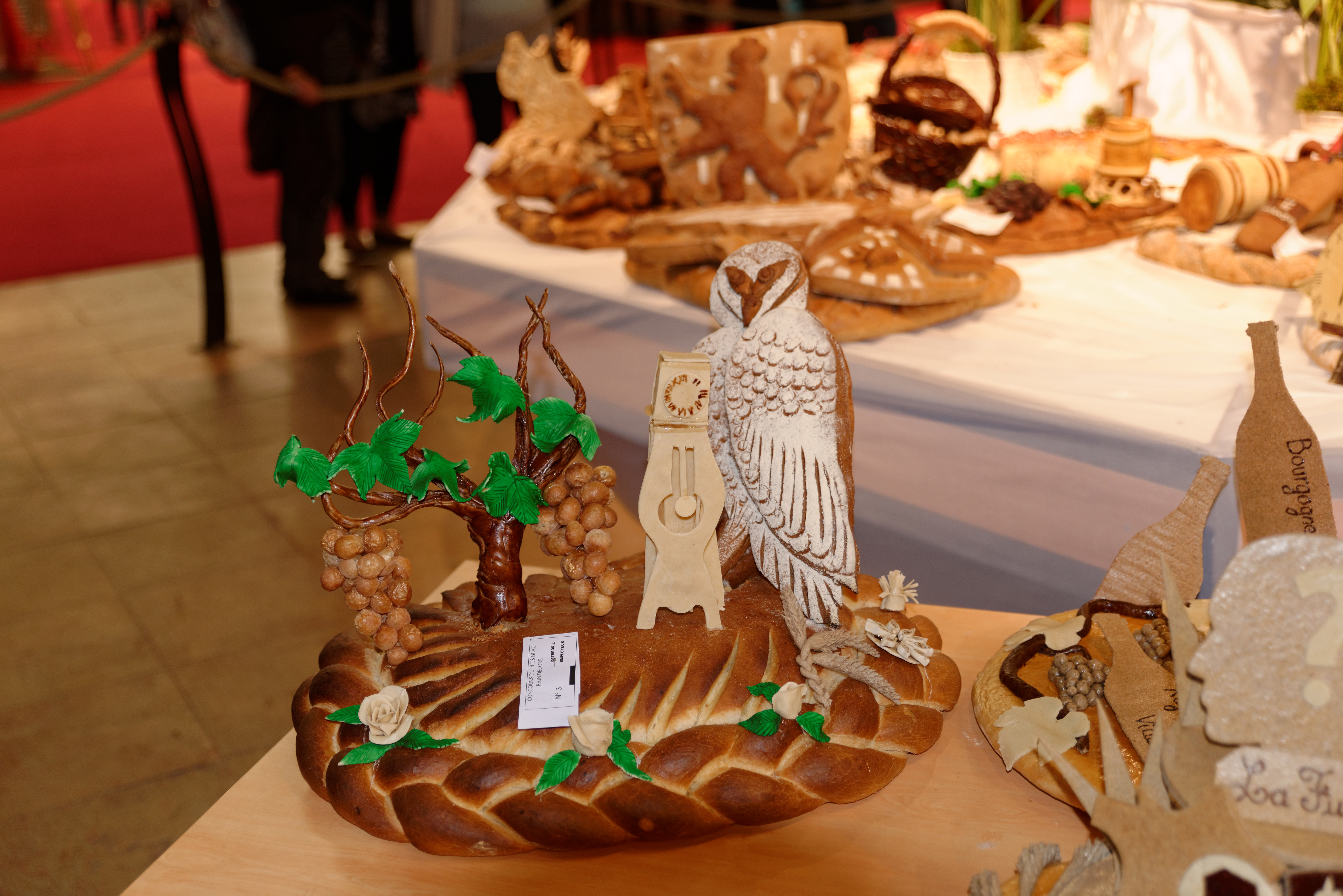 Table de Luculus. Journée de la boulangerie - concours du plus beau pain décoré. Foire internationale et gastronomique de Dijon 2015 (Côte d'Or, Bourgogne-Franche-Comté, France).